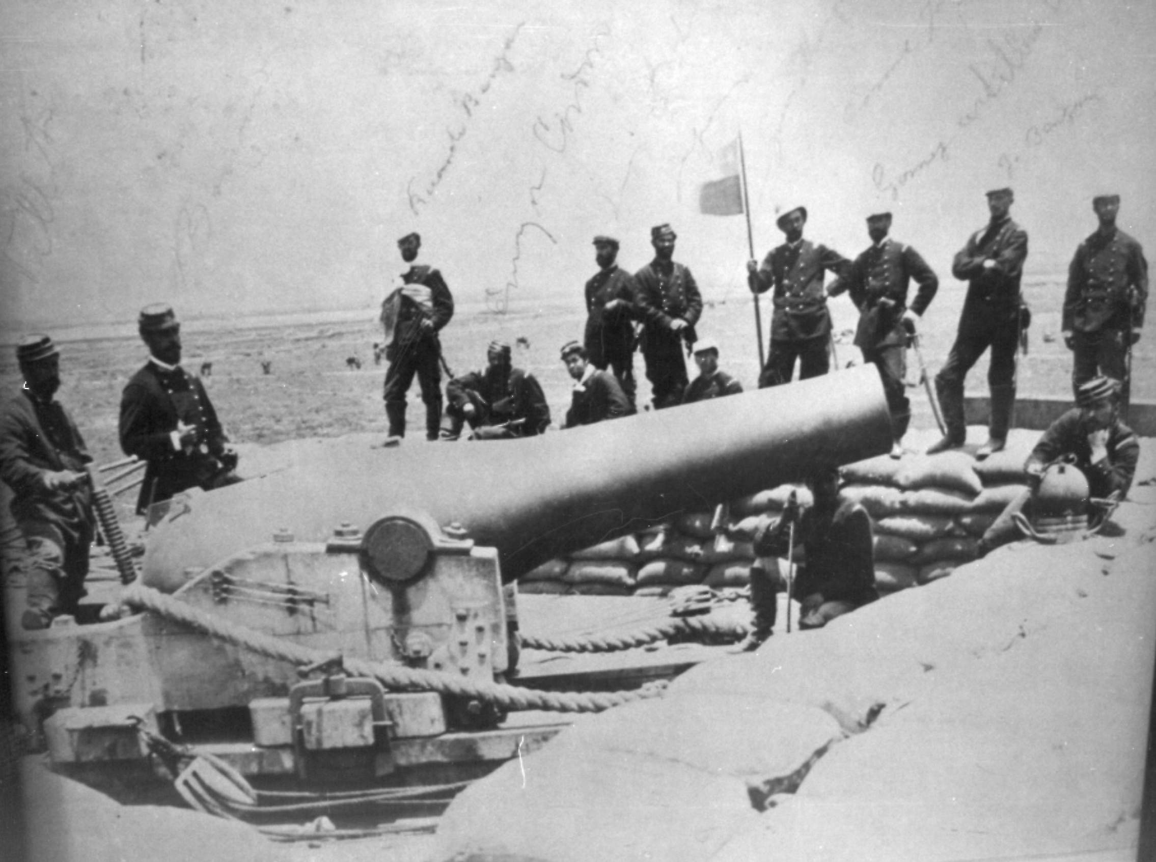 El cañón Rodman fue usado por los defensores de Lima en la batalla de Miraflores (15-01-1881). En la imagen se ve a los chilenos posando con su trofeo de guerra. Foto: "La Guerra de nuestra memoria". ver tambien